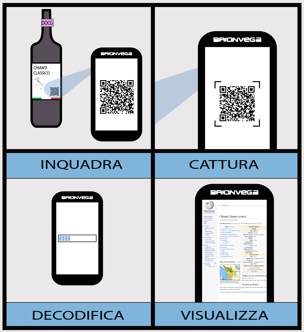 Illustrazione che mostra come utilizzare un lettore di codici QR per estrapolarne le informazioni in esso contenute